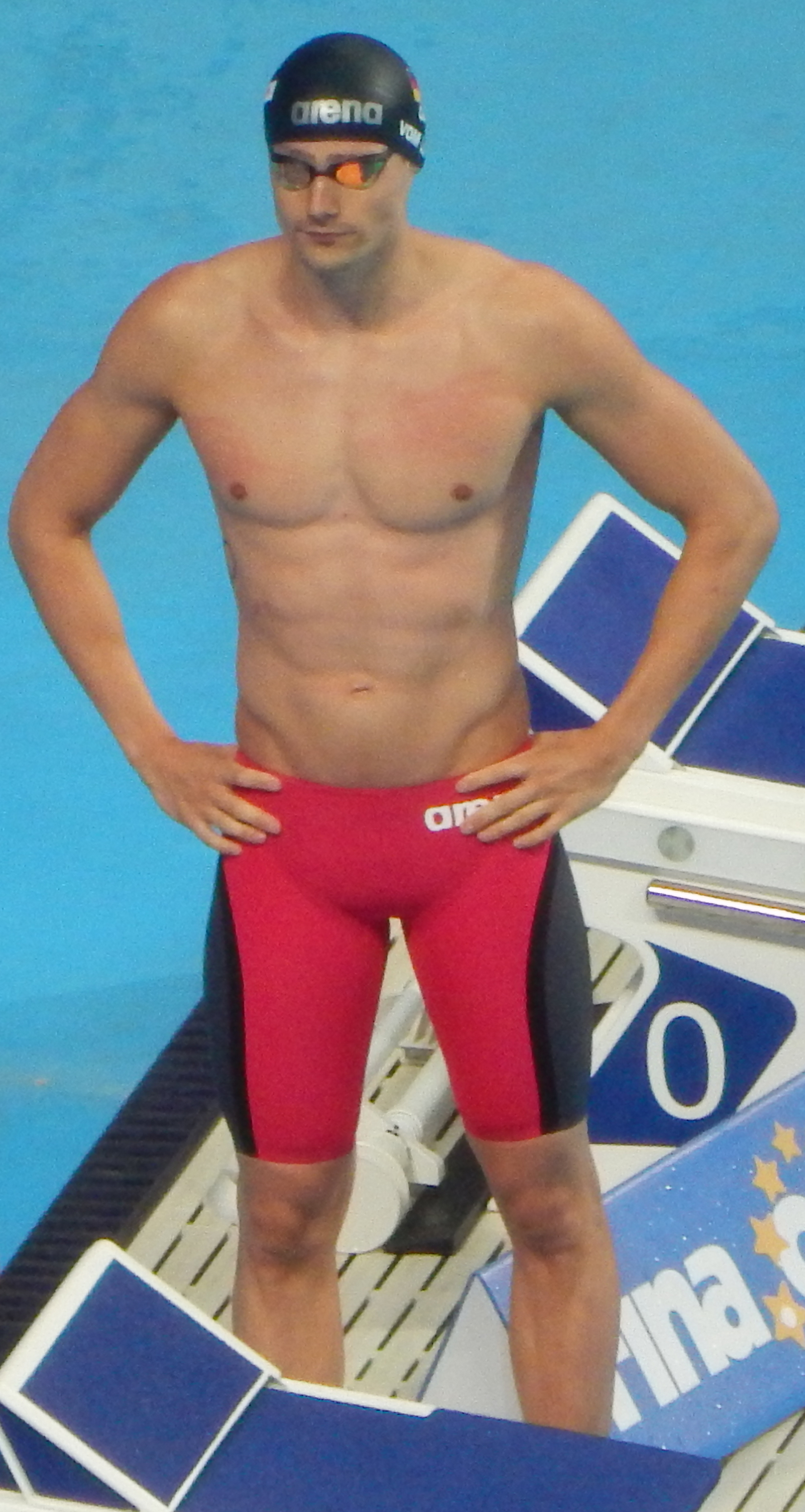 Кристиан фон Лен на чемпионате мира в Казани